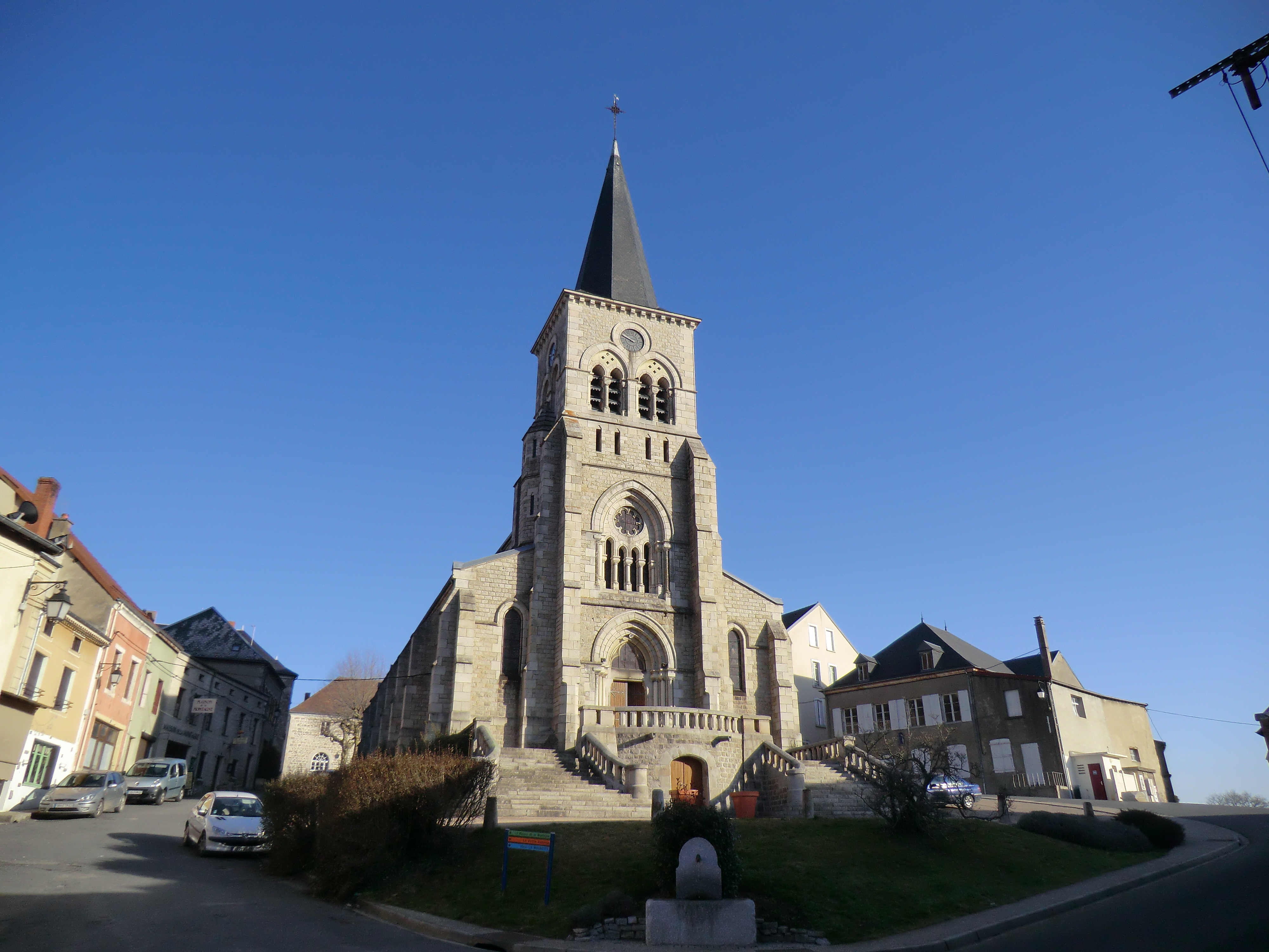 Photo de l'église de: Le-mayet-de-montagne